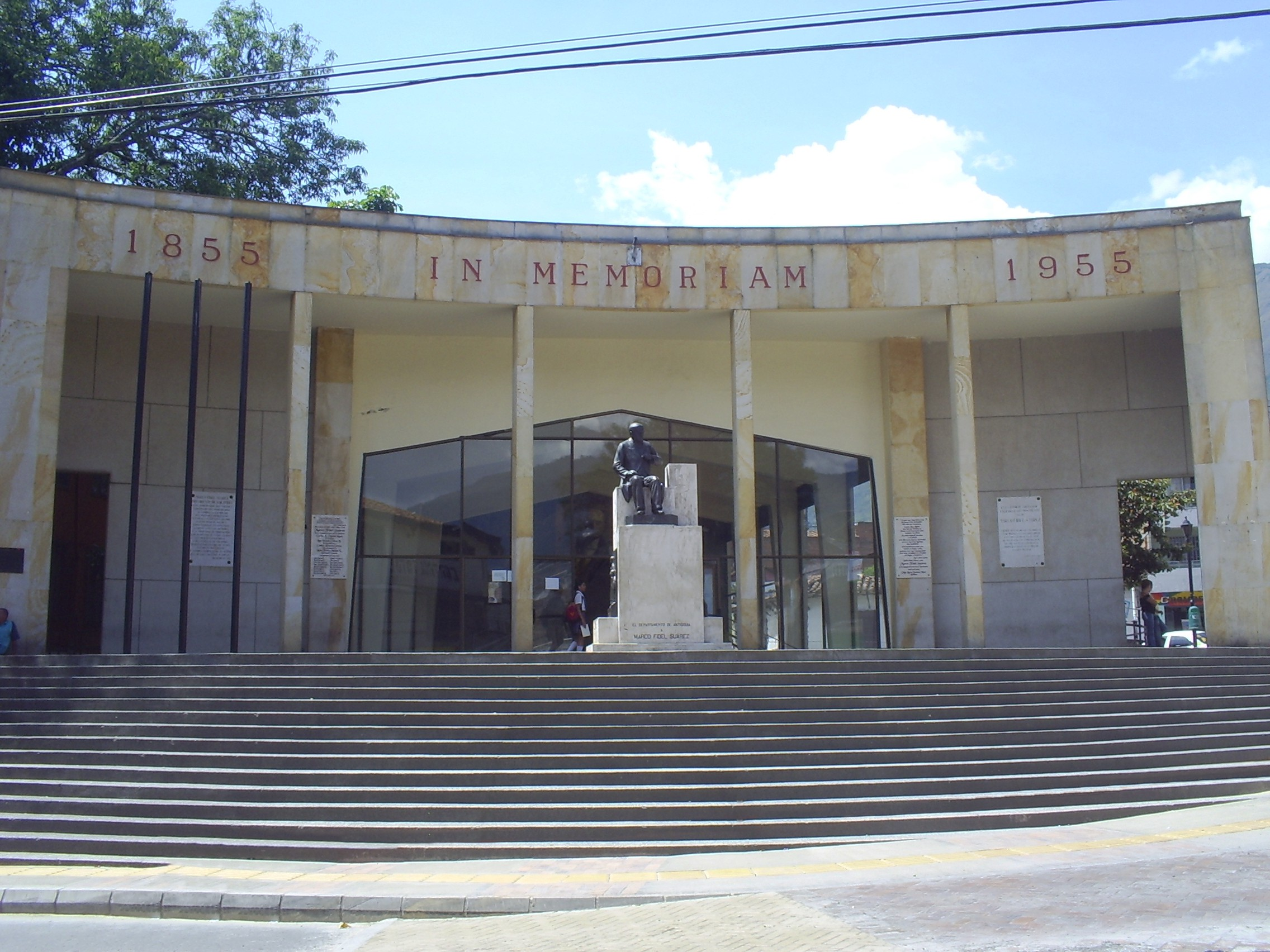 Monumento Nacional a Don Marco Fidel Suárez. Bello, Colombia.